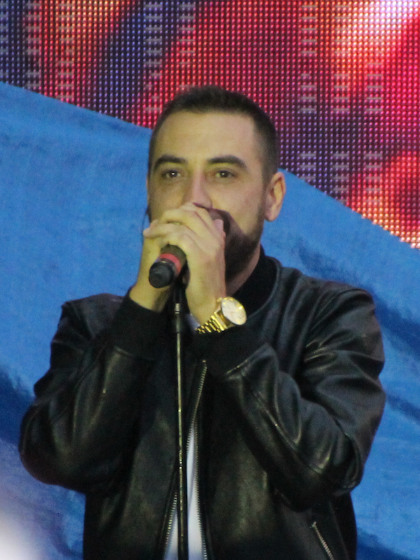 Coez